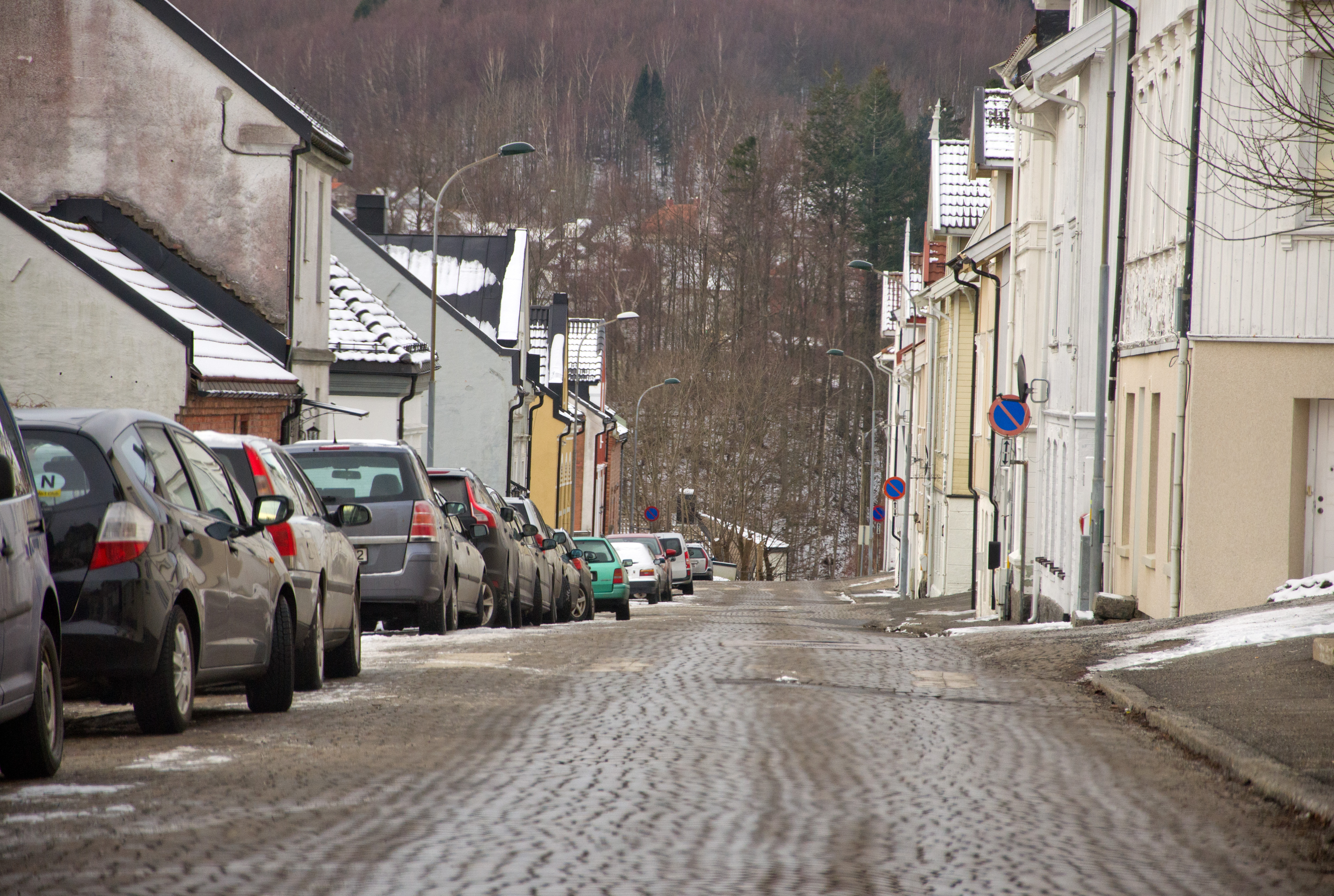 Vestfolds fylkesvei 104 Nedre Bøkeligate i Larvik